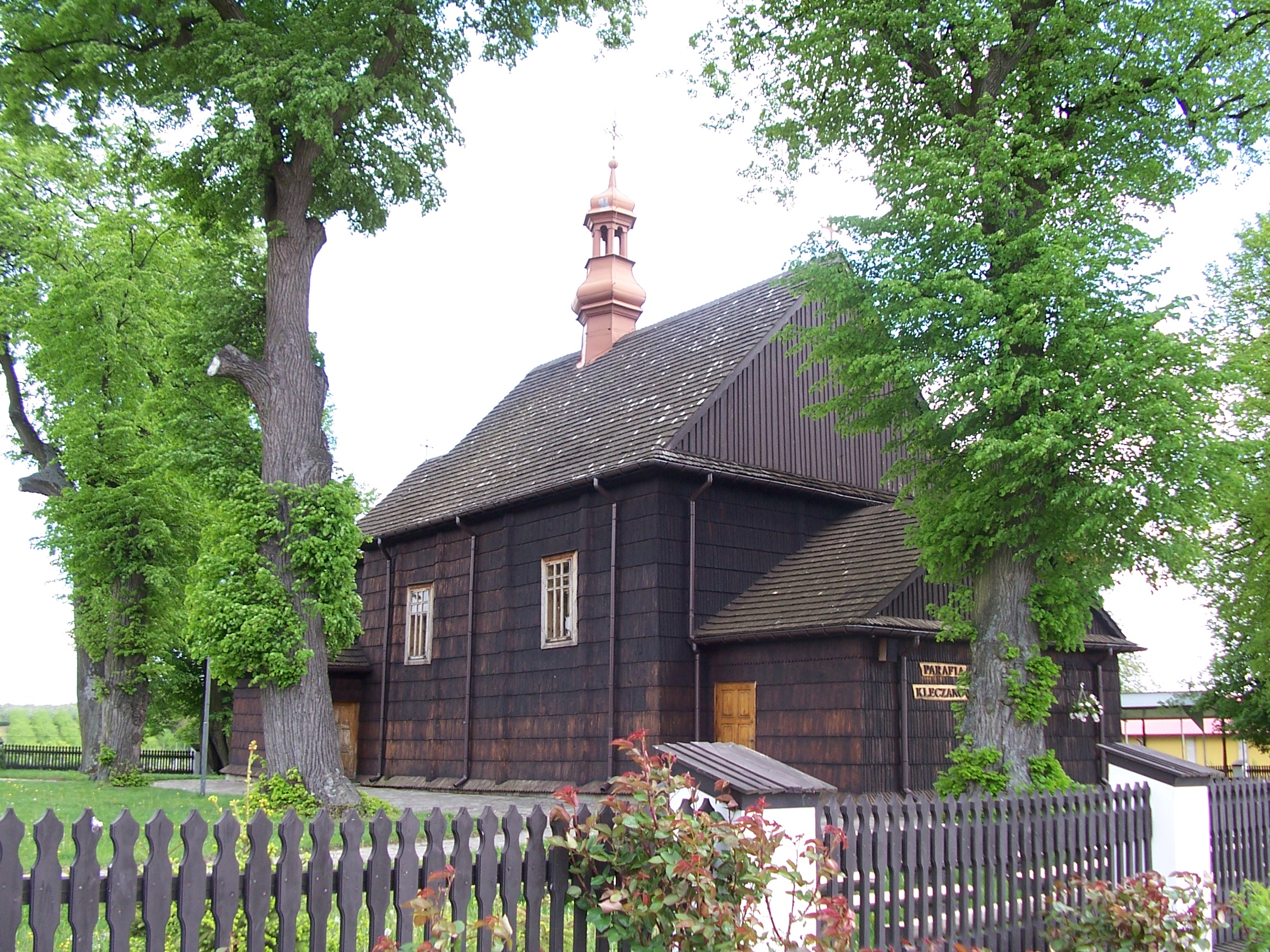 Kościół św. Katarzyny i św. Stanisława Biskupa w Kleczanowie